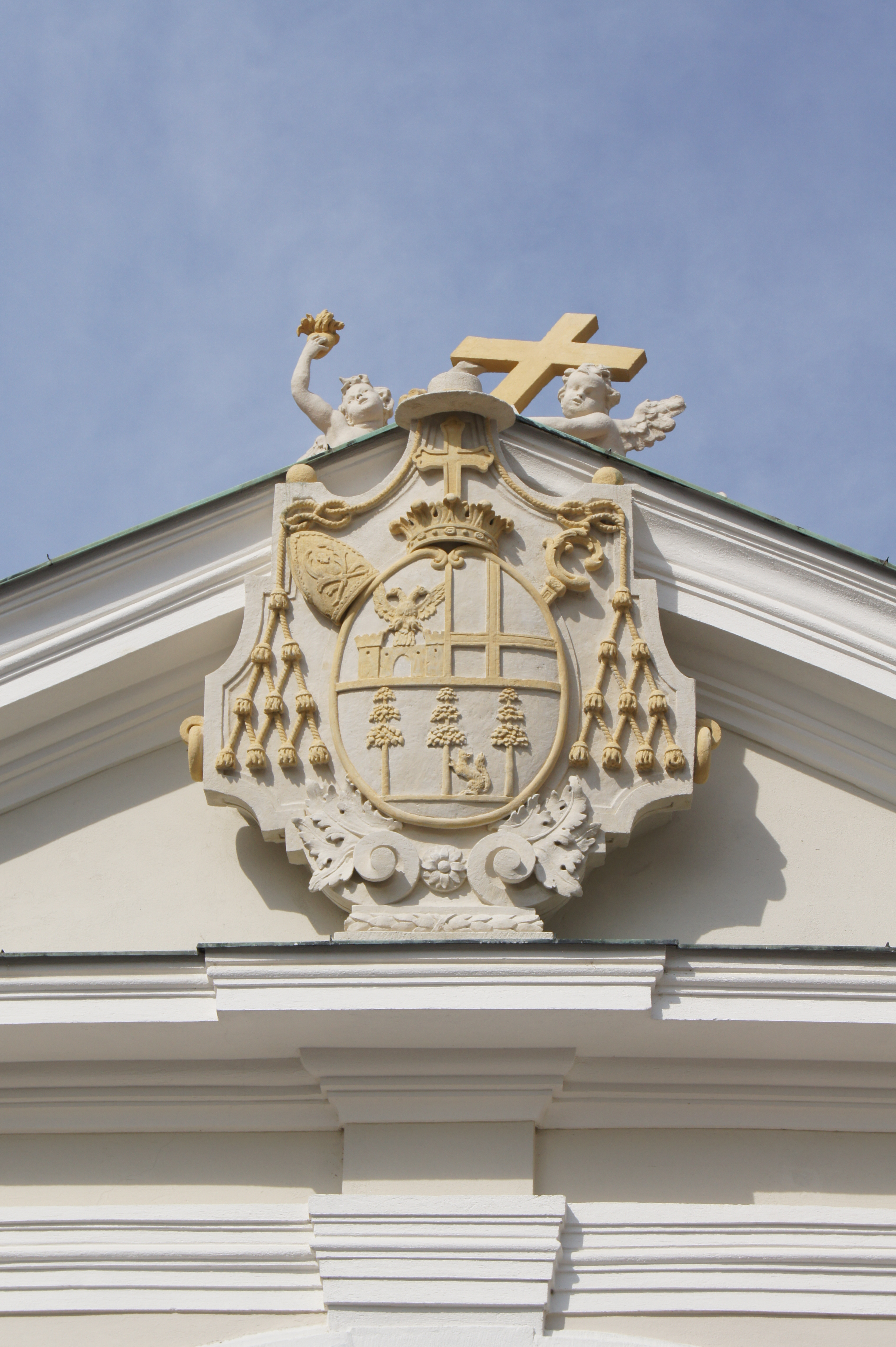 Bistumsgebäude mit Gartenbaudenkmalen, Brunnen und Kreuz - Wappen von Bischof Johann Heinrich von Kerens am Bischofstor